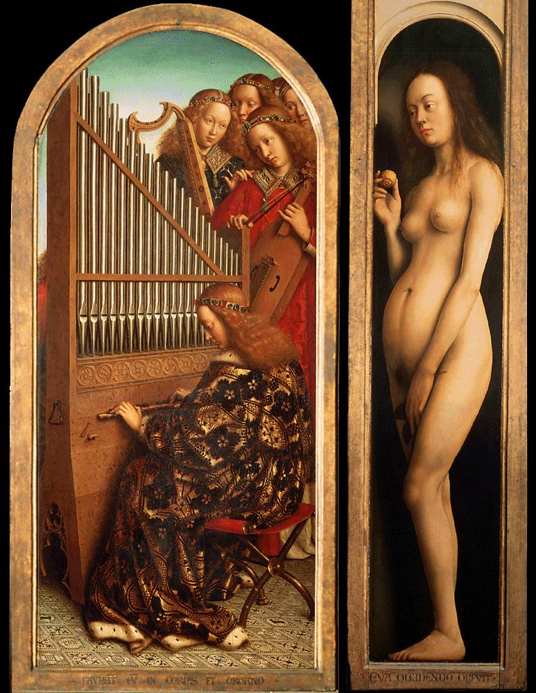 retable de l'Agneau mystique detail